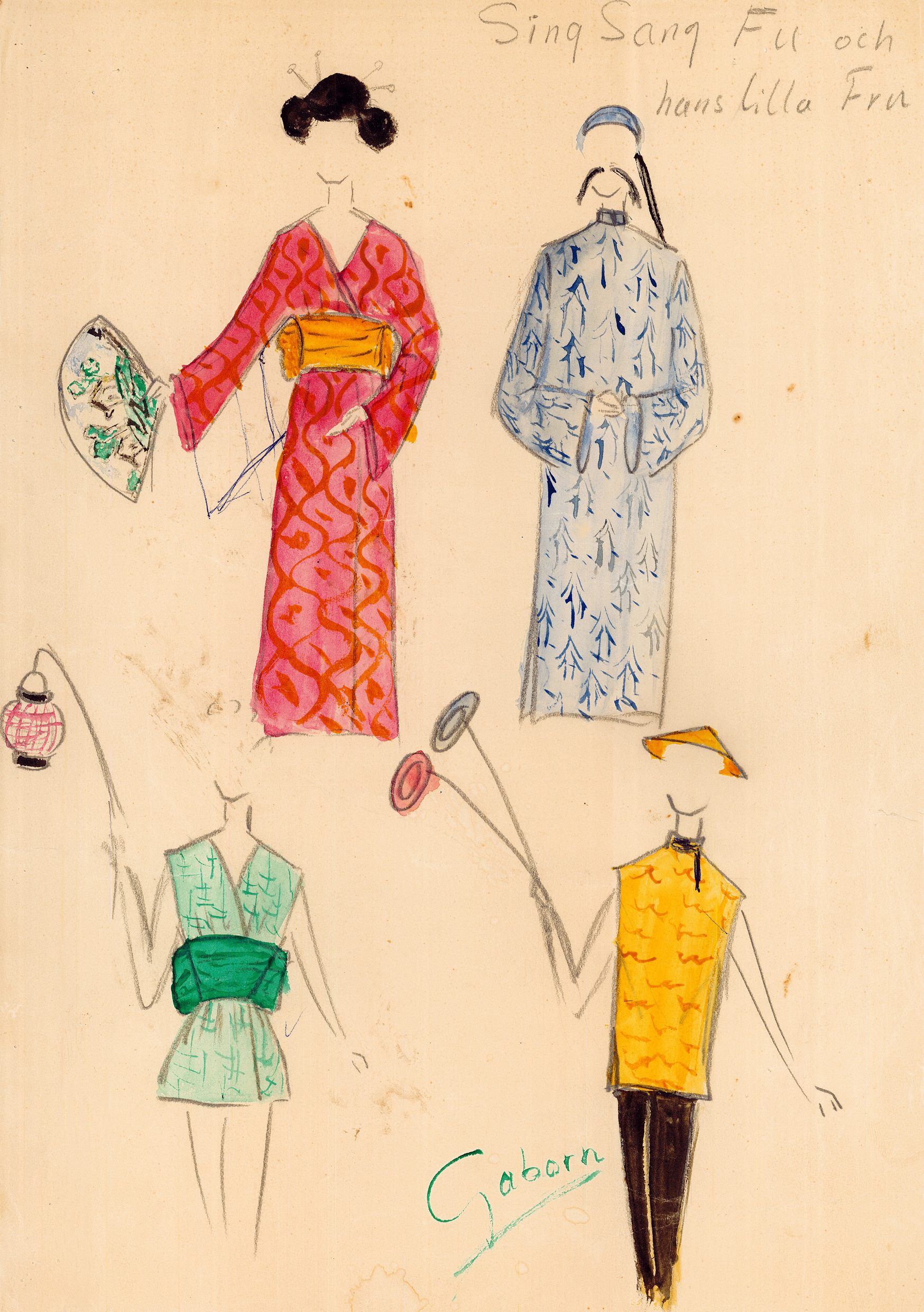 En av Svenbörje Gaborns efterlämnade skisser. Sannolikt till en av Ebba Falks elevföreställningar.